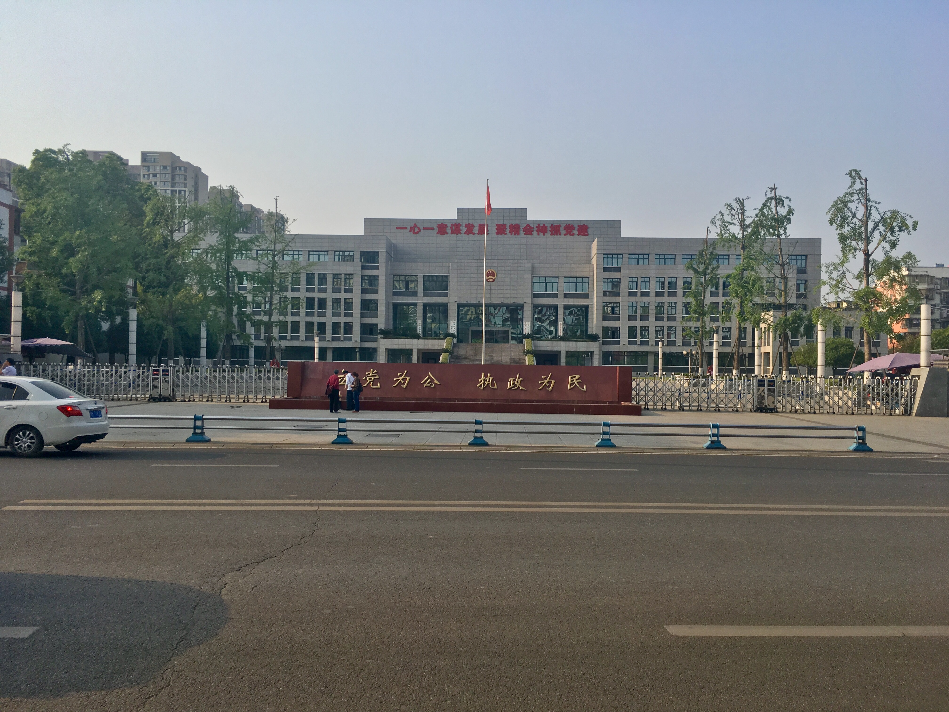 iPhone SE拍摄，运用iOS照片app修饰